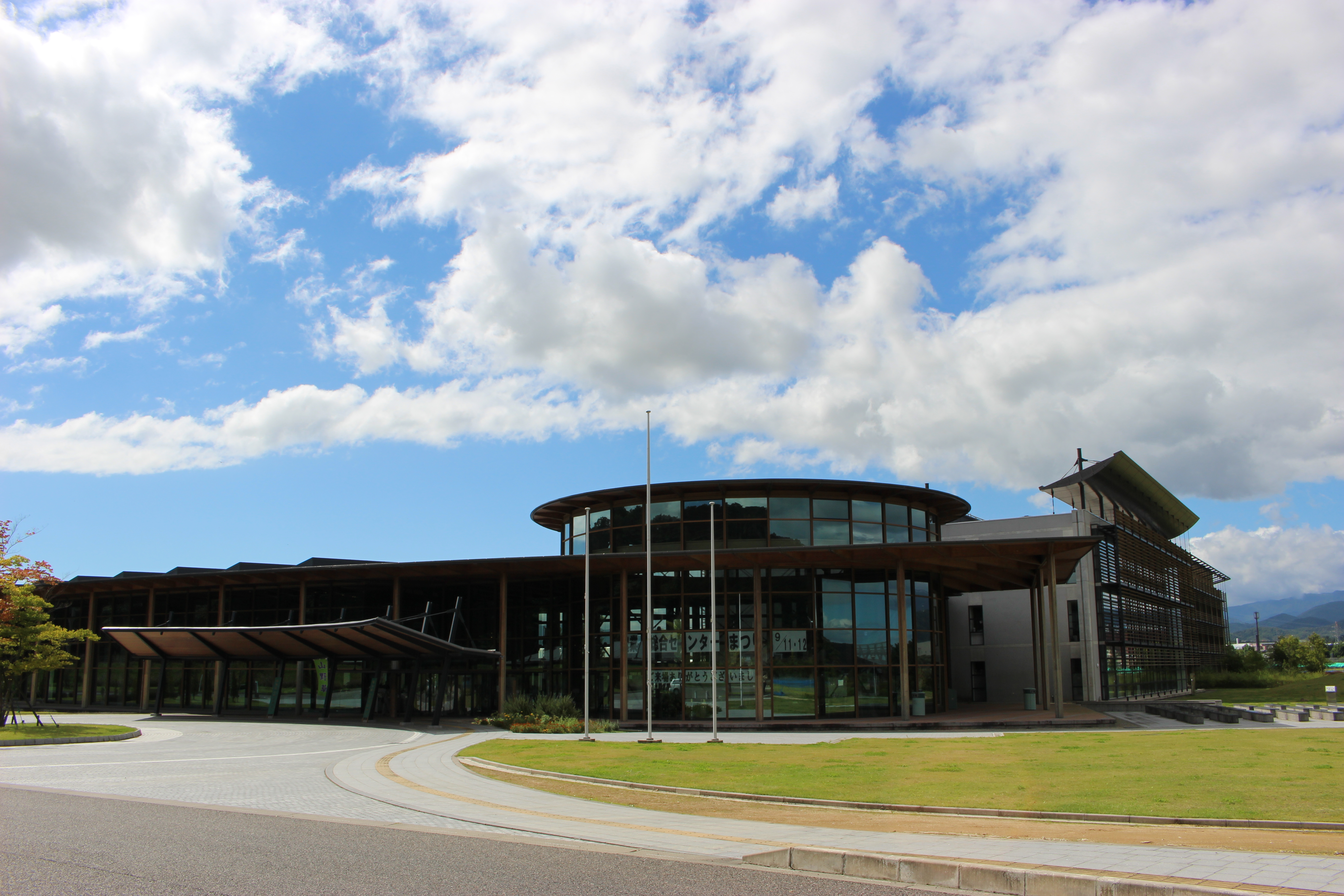 福島県農業総合センター